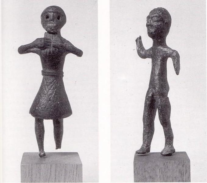 Statuine collezione museo del Torcello